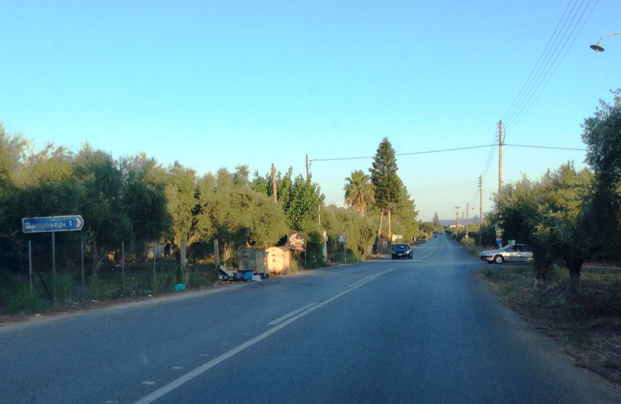 Βρομονέρι Μεσσηνίας. Η στροφή εισόδου προς τον οικισμό.